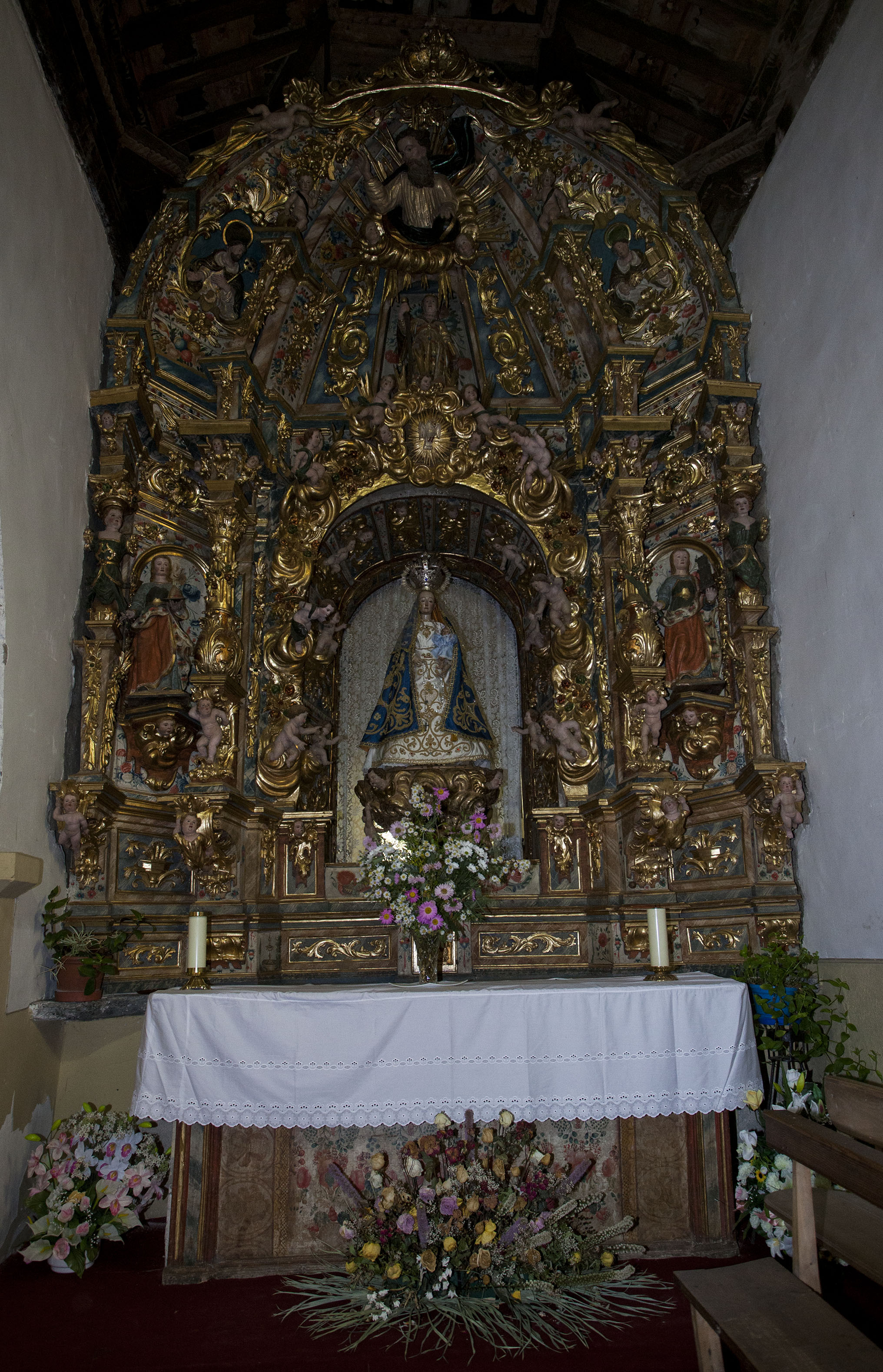 Retablo de Nuestra Señora del Rosario de la iglesia parroquial de Albares de la Ribera